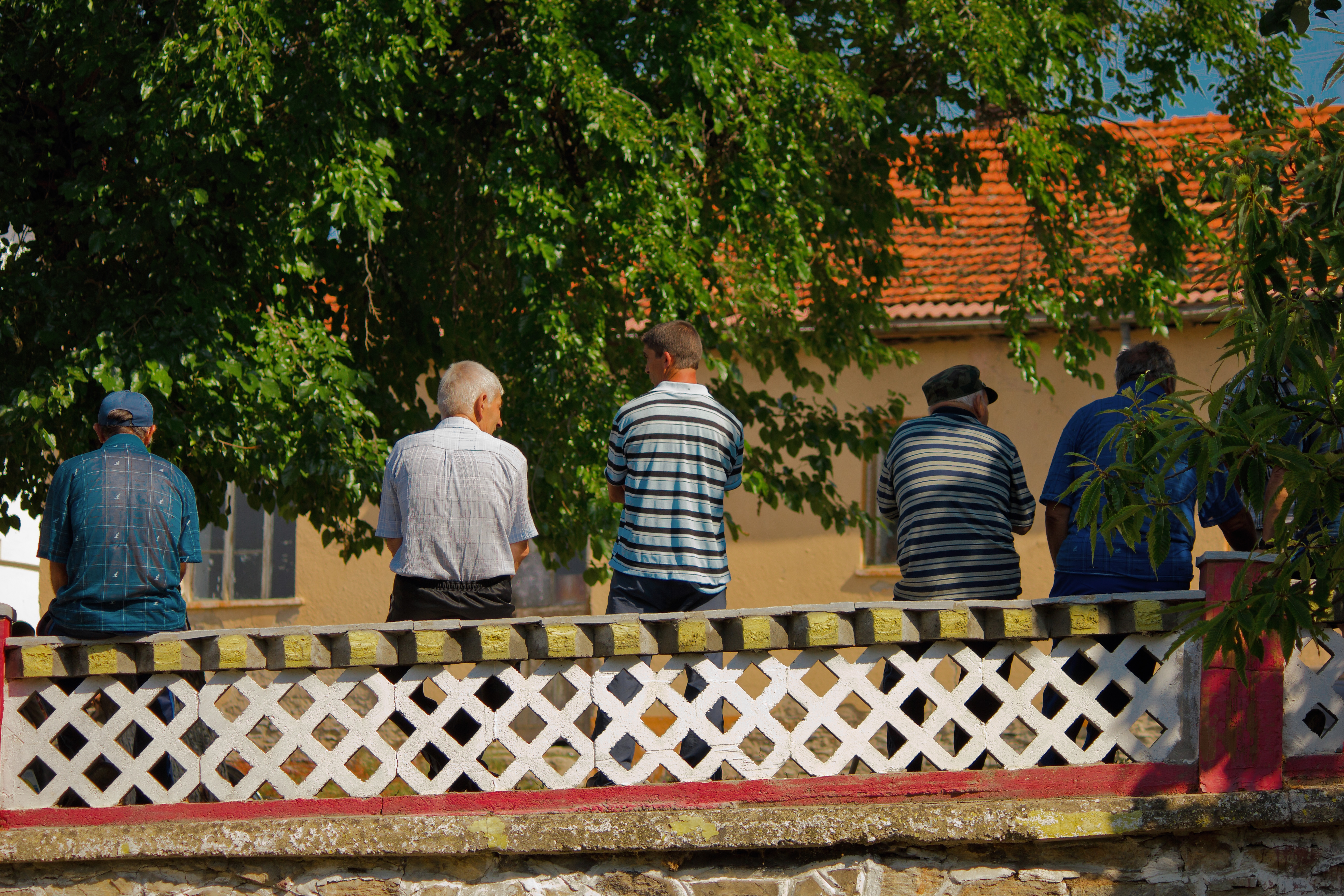 Хора от Туховища